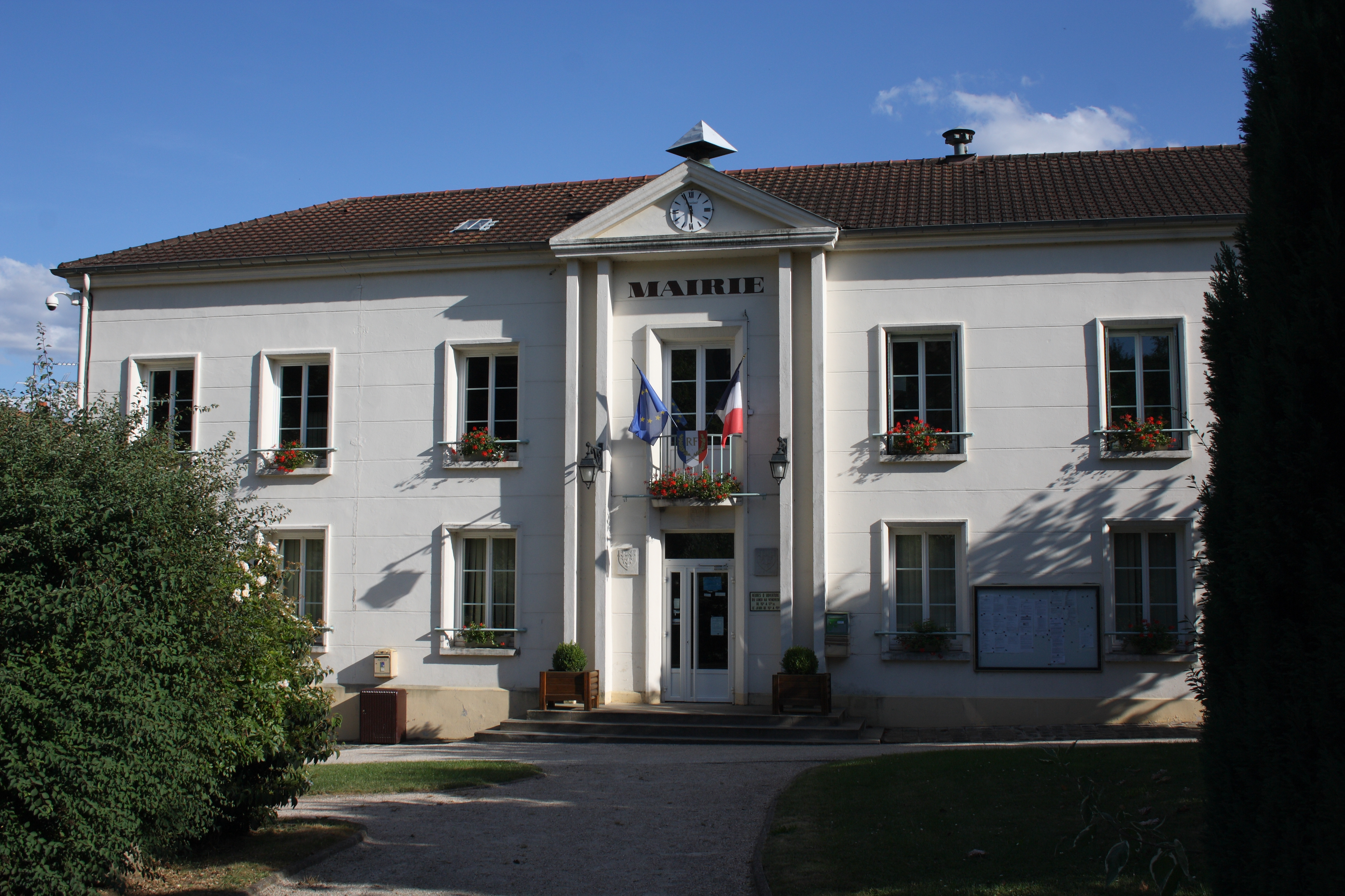 Bürgermeisteramt (Mairie) in Piscop im Département Val-d’Oise (Île-de-France